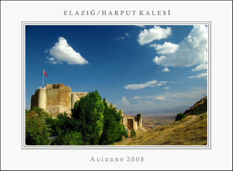 HARPUT KALESİ (SÜT KALESİ) EFSANESİ Harput Kalesi'nin bir adı da Süt Kalesi'dir. Bu kaleye Süt Kalesi denmesinin ilginç bir hikayesi vardır. Kalenin temelleri atılır. Kale duvarları yükselmeye başlar. Ancak o yıl başlayan su kıtlığına bir çare bulunmaz. Aynı yıl bu su kıtlığının aksine hayvanların sütleri oldukça boldur. Zamanın hükümdarı emir verir. Harç için süt kullanılacaktır. Hayvanlar sağılır. Harç süt ile karılır, kale tamamlanır. Diğer bir efsaneye göre ise kalenin pek çok dehlizi vardır. Bu dehlizlerden birinde güzellerden bir kız yaşarmış. Ancak büyülü olduğundan sürekli kendisi için yaptırılan bir altın köşkte uyumaktaymış. Yalnız her yıl bir kez uyanır. "Süt Kalesi yıkıldı mı? Katırlar kuzuladı mı? Dere hamamının yerinde yeller esiyor mu?" diye sorar, sonra yeniden uykuya dalarmış. Eğer bu sayılanlar gerçekleşirse Harput yıkılacak, kıyamet kopacakmış. Bazı kişilerin bu kızın sesini duyduğunu da kulaktan kulağa söylenir.